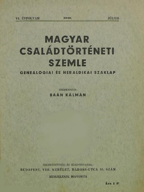 Magyar Családtörténeti Szemle címlapja (1940. július), kivágott címerrel